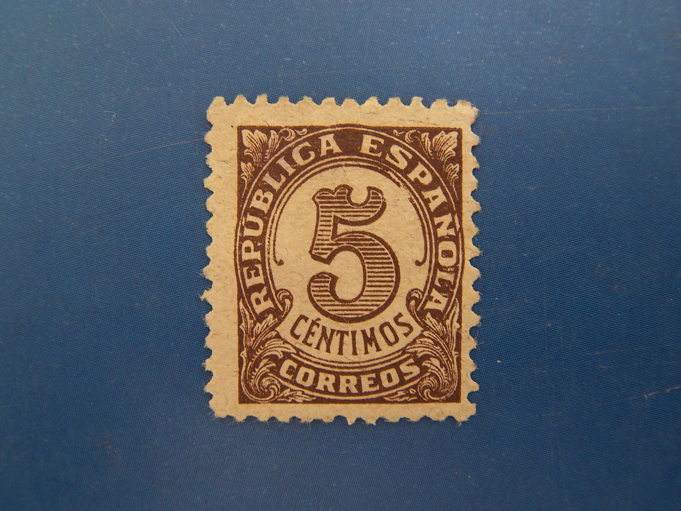 Sello 30 céntimos República Española, 1938